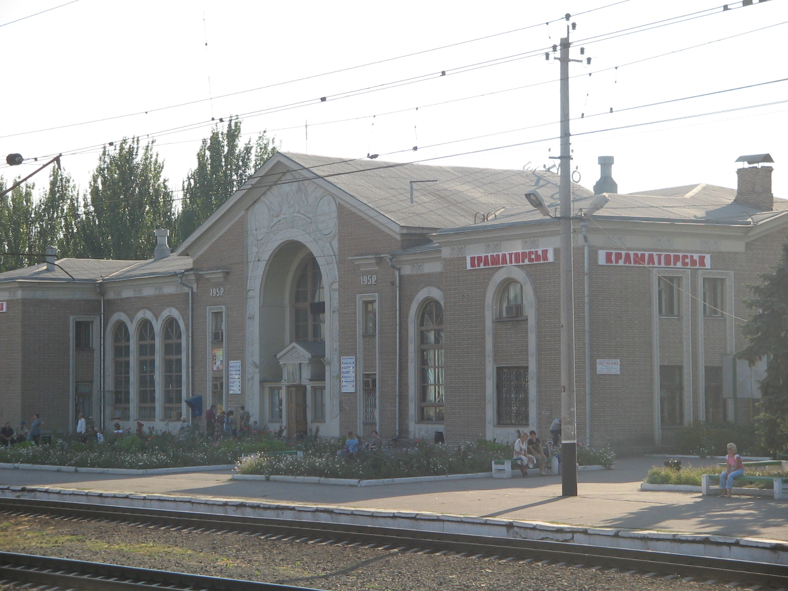 Вокзал города Краматорск